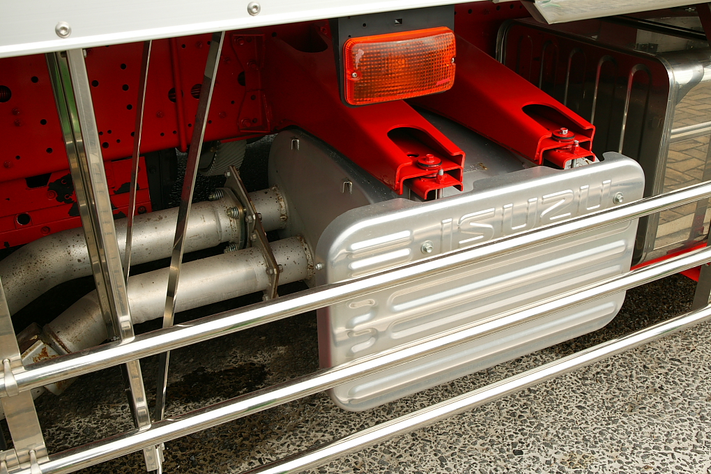 Muffler of Isuzu GIGA.